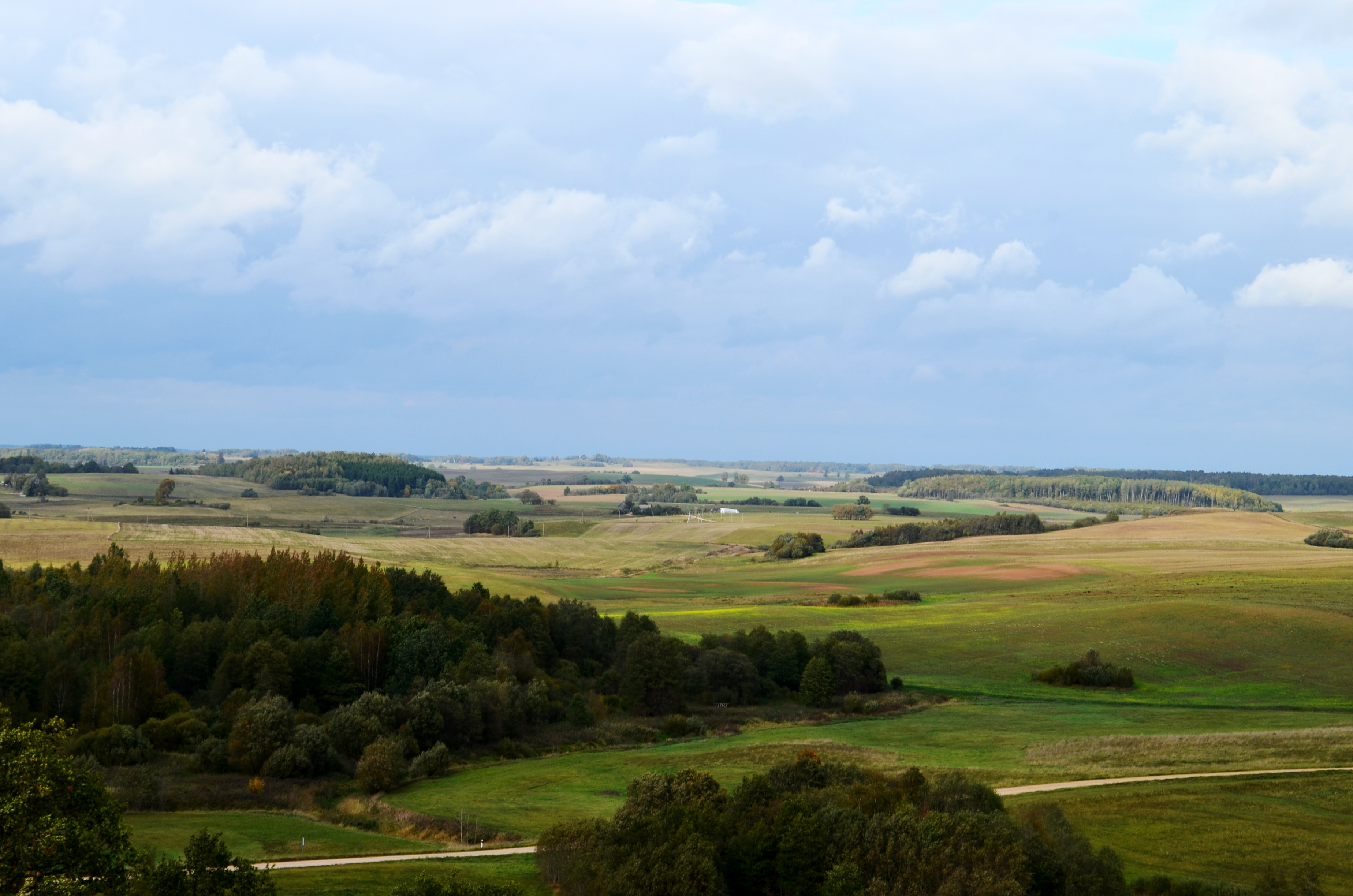 Žemaičių aukštuma nuo Sprūdės piliakalnio, Telšių raj.